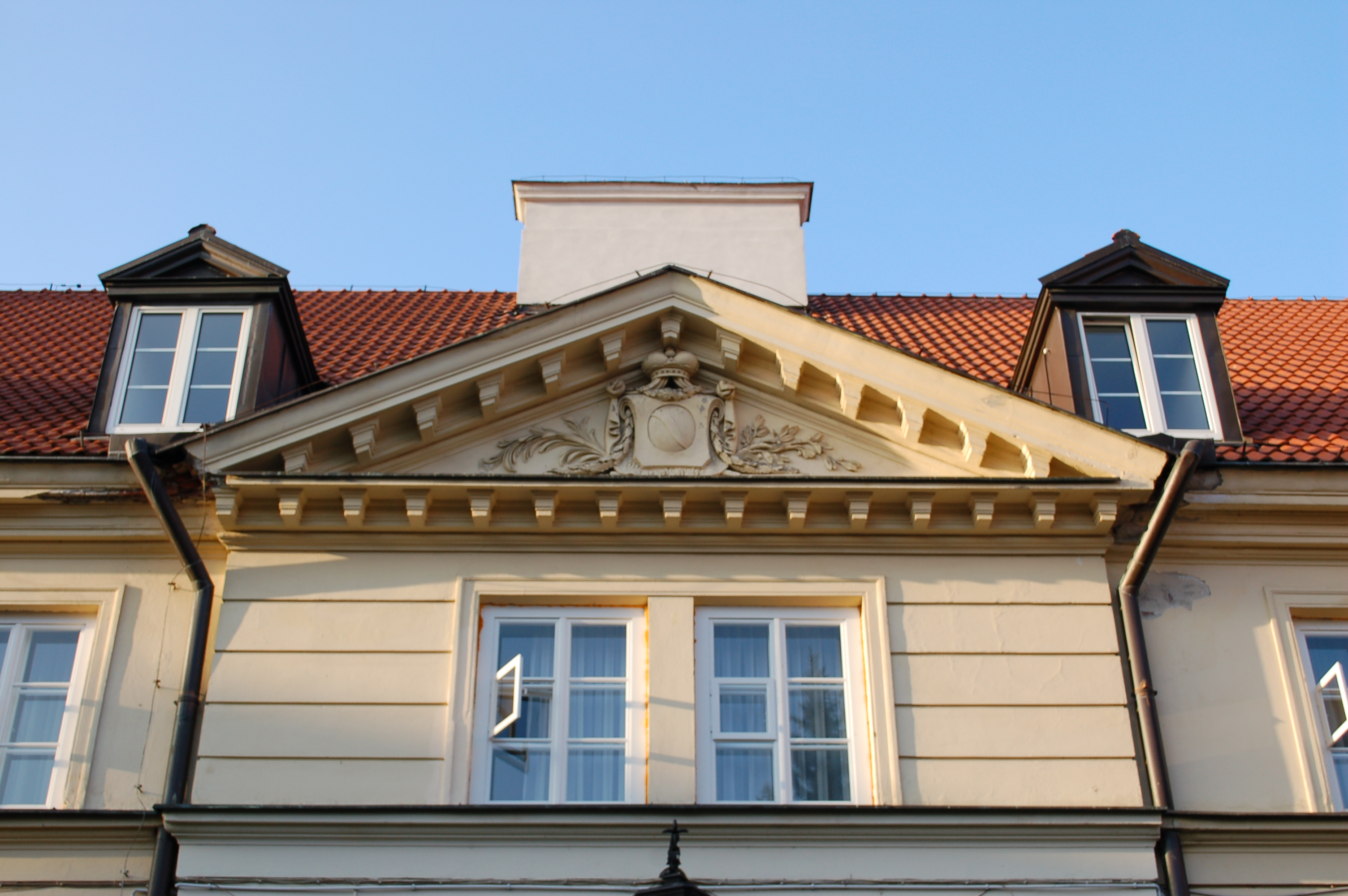 Długa 26, Warschau